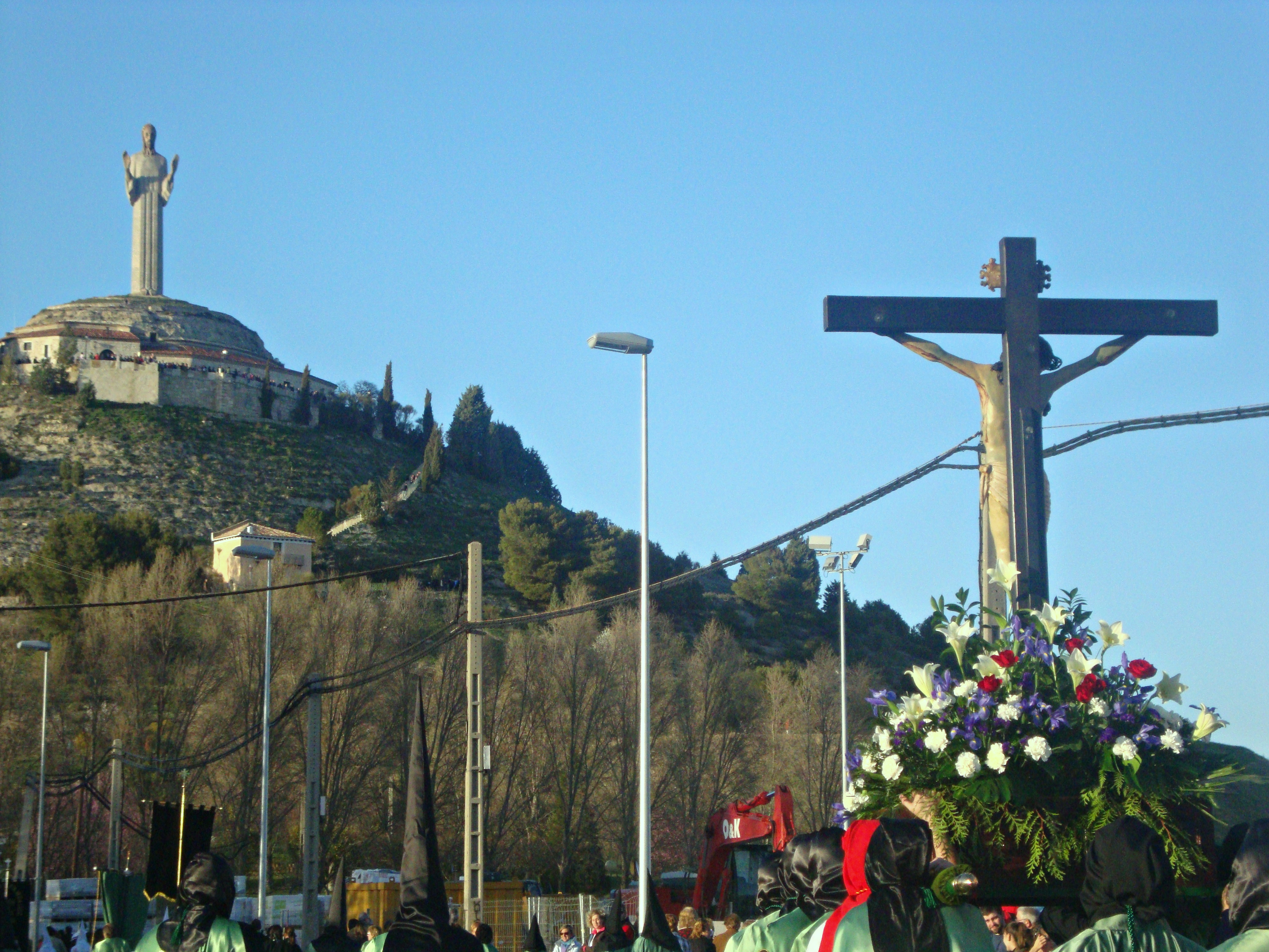 Procesión del Santo Rosario del Dolor, subida al Cristo del Otero. Semana Santa de Palencia. España.